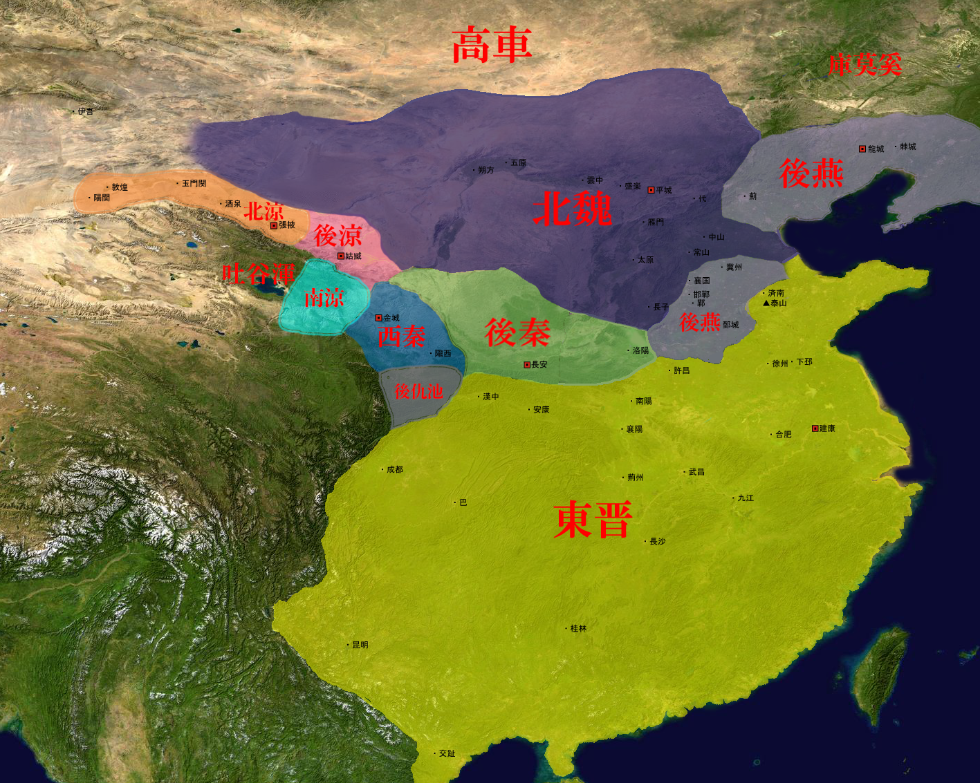 397年ごろの五胡十六国時代の地図